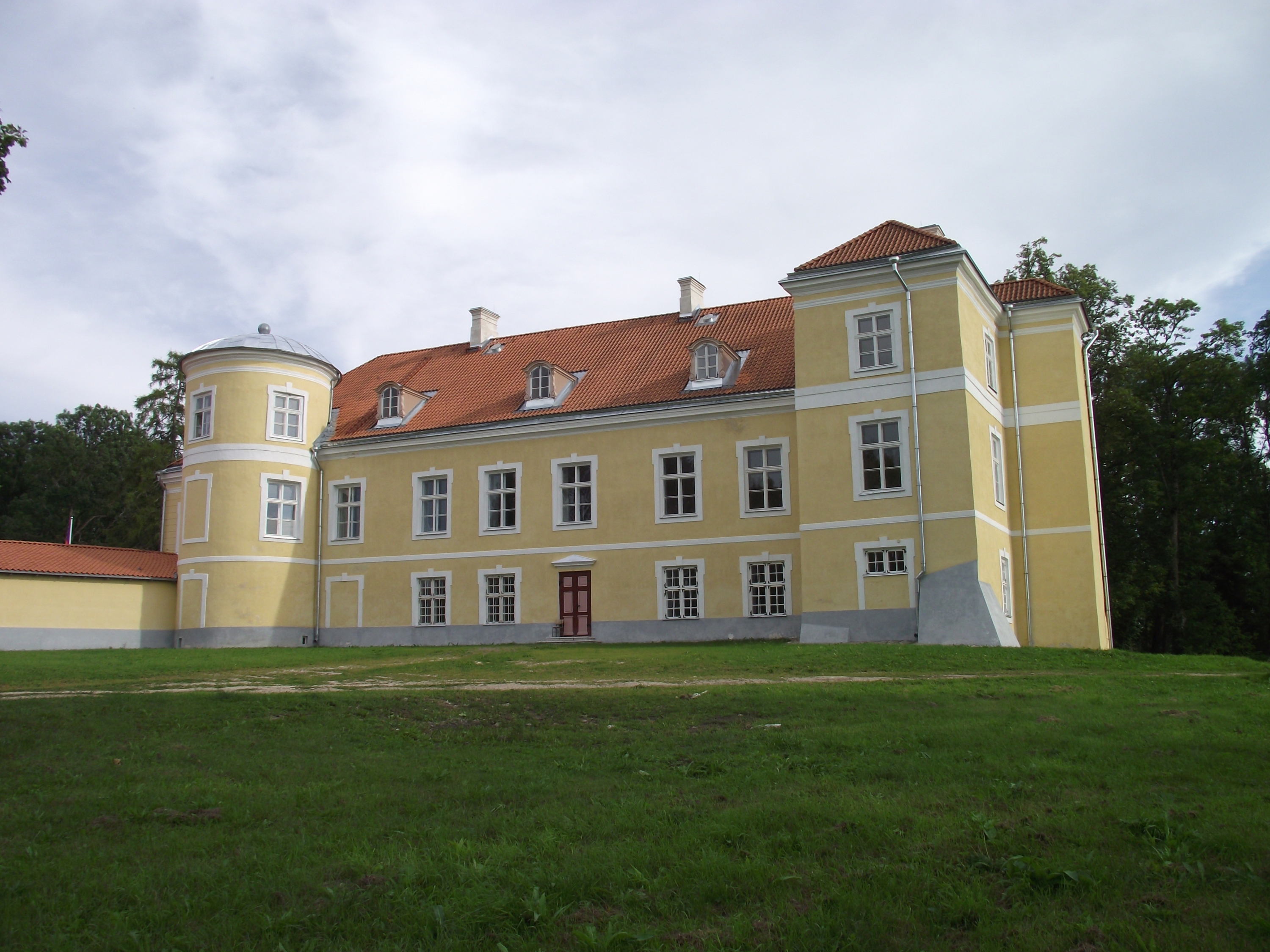 Kiltsi mõisa peahoone